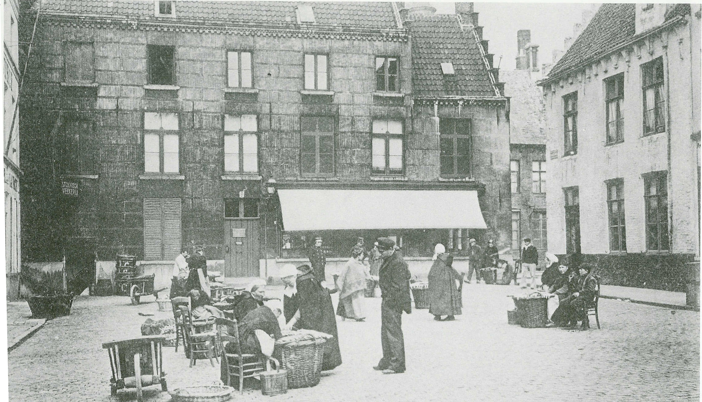 Zicht op het Huidenvettersplein te Brugge, begin 20ste eeuw.